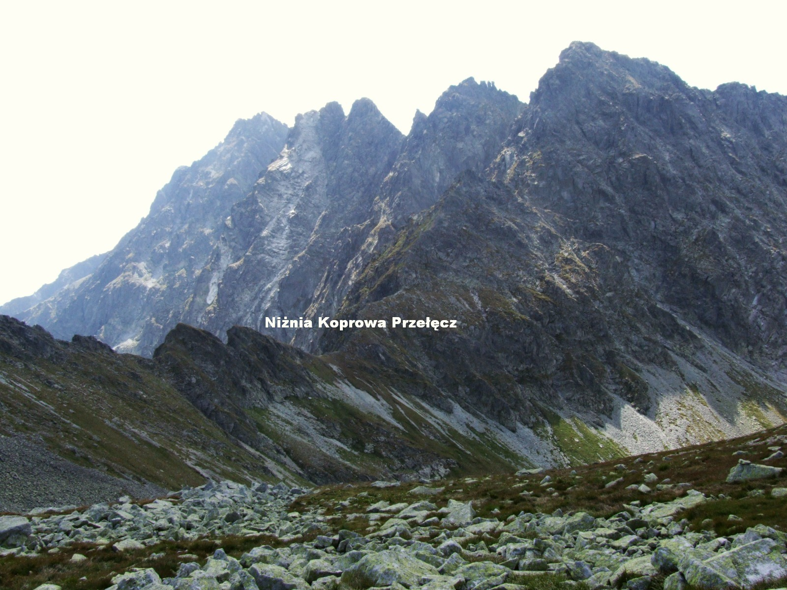 Hlińska Turnia i Grań Baszt. Widok z Koprowej Przełęczy